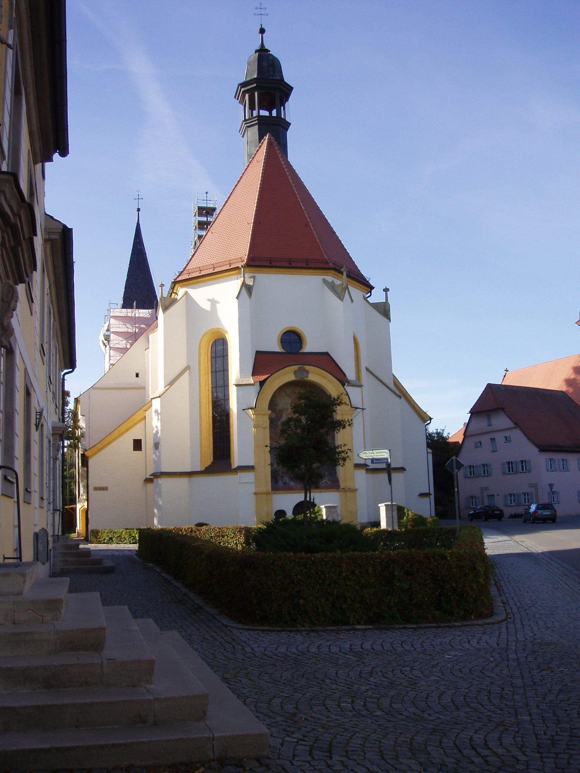 Stiftskirche Herrieden